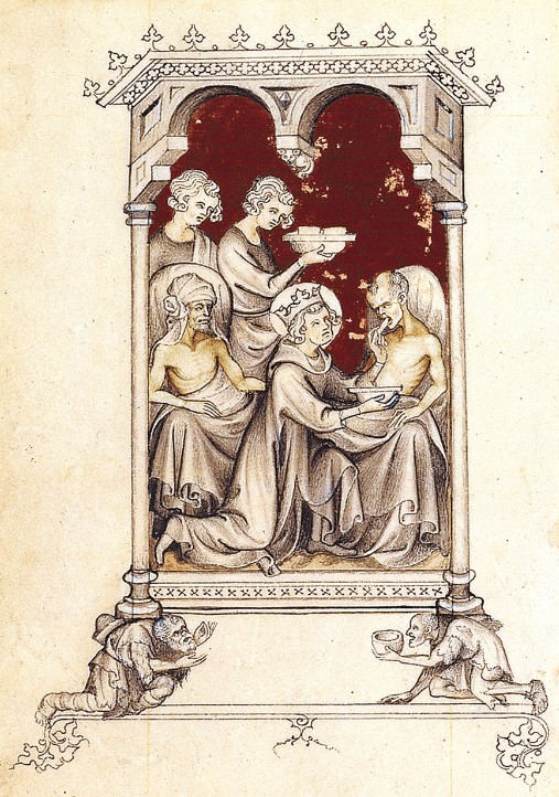 Ludvík IX.